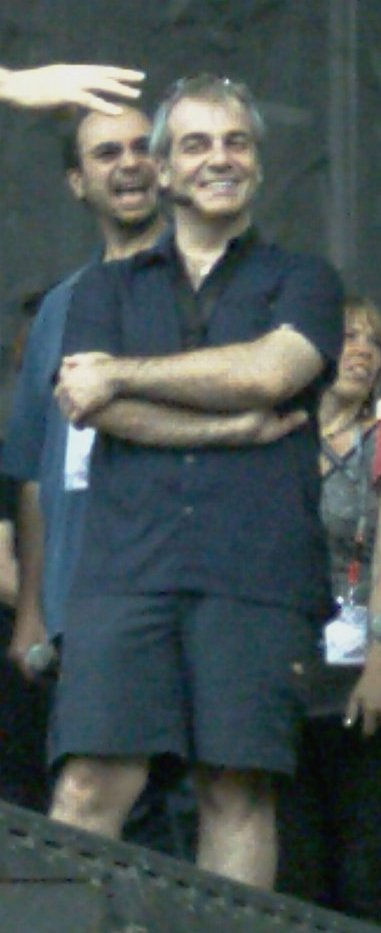 Jean Lemire lors de la pratique du spectacle Terre Planète bleue présenté aux FrancoFolies de Montréal